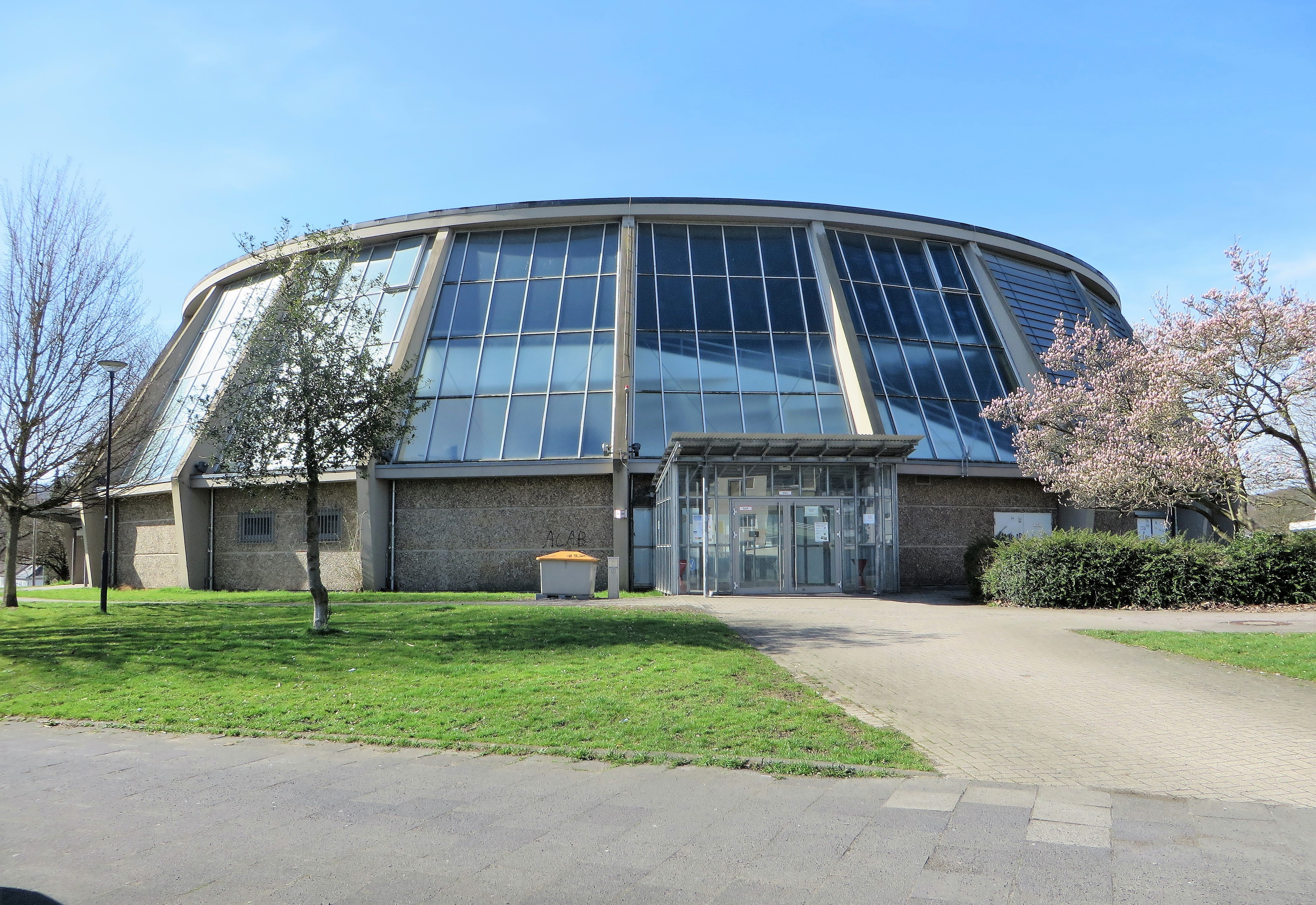 Rundsporthalle Elsey in Hagen-Hohenlimburg, Königsberger Straße 1 Ecke Im Kley. Errichtet von der Stadt Hohenlimburg und feierlich übergeben am 15. Juli 1967. Weltweit gab es eine solche Halle zur damaligen Zeit nur dreimal. Eine in Österreich, eine in Arnsberg und hier in Hohenlimburg. Heimspielstätte des HSG Hohenlimburg (Spielgemeinschaft TSV Germania-Reh, TuS Oege).